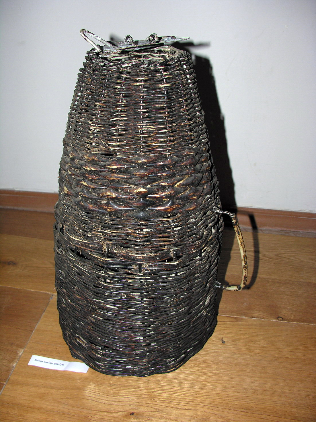 Žemaitėška: Bučios, 2006-11-21, Žemaitėjė